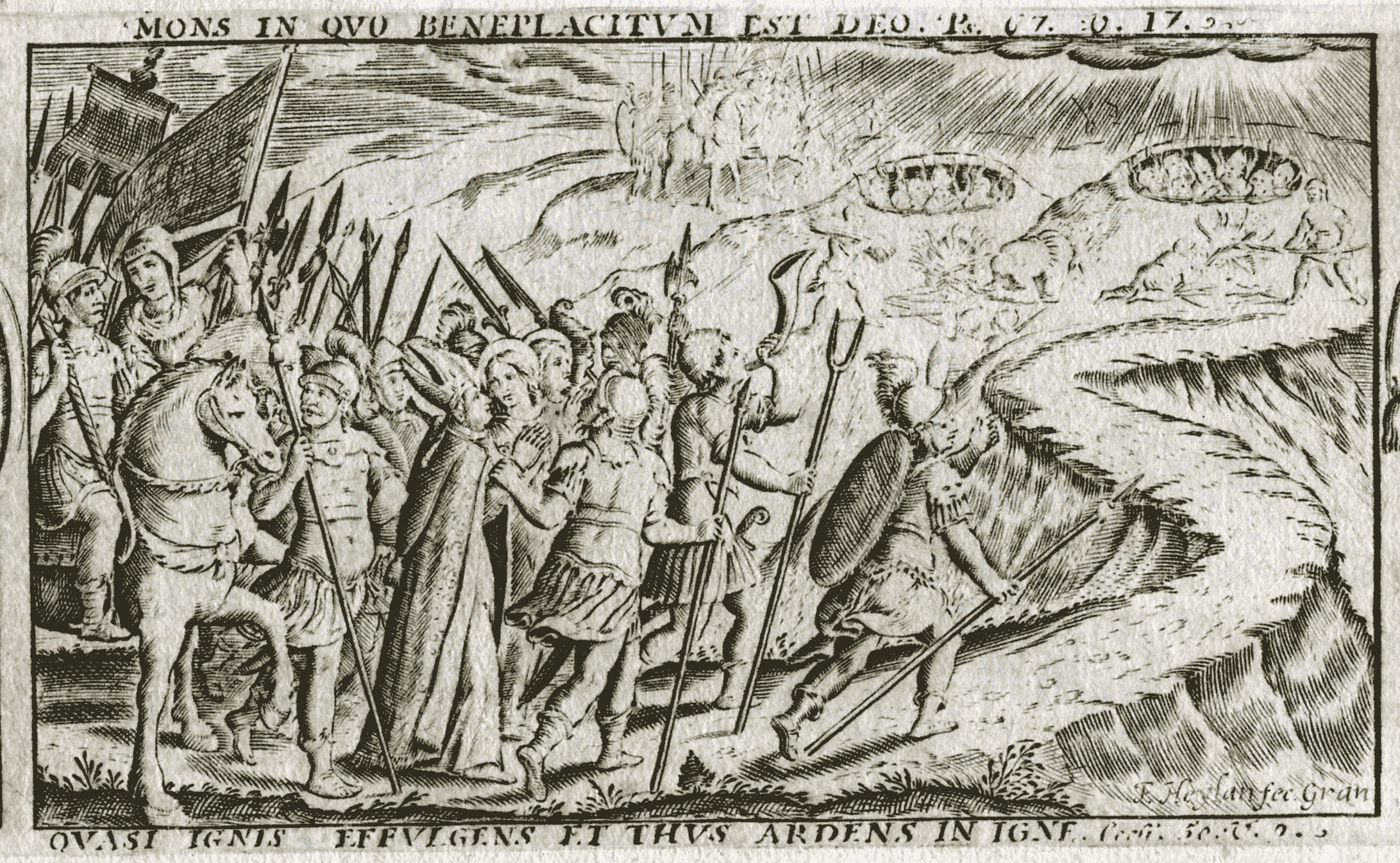 Parte central del grabado de Francisco Heylan "Martirio de San Cecilio y dos escudos"